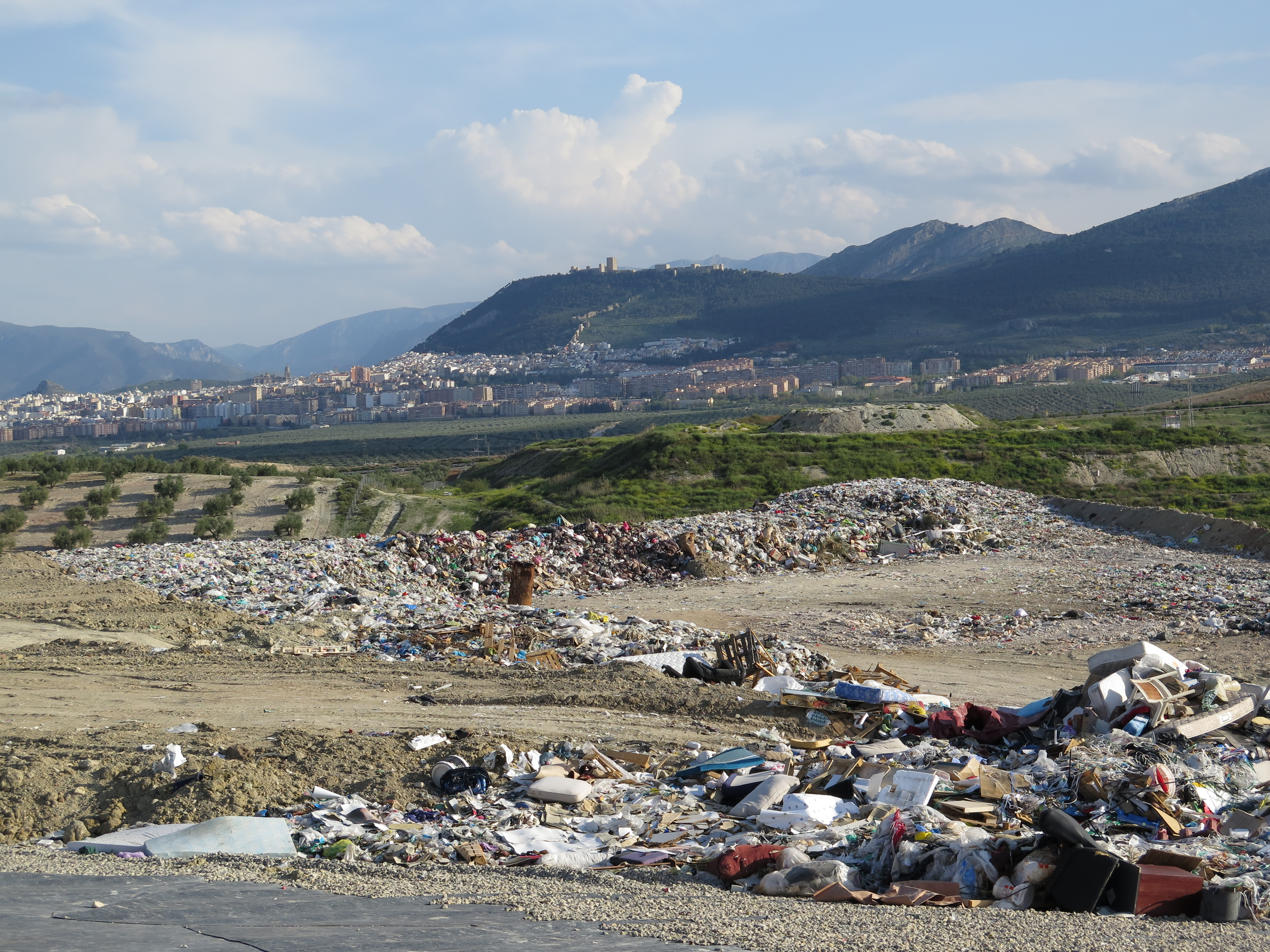 El vertedero municipal de Jaén, en la carretera de Fuerte del Rey.